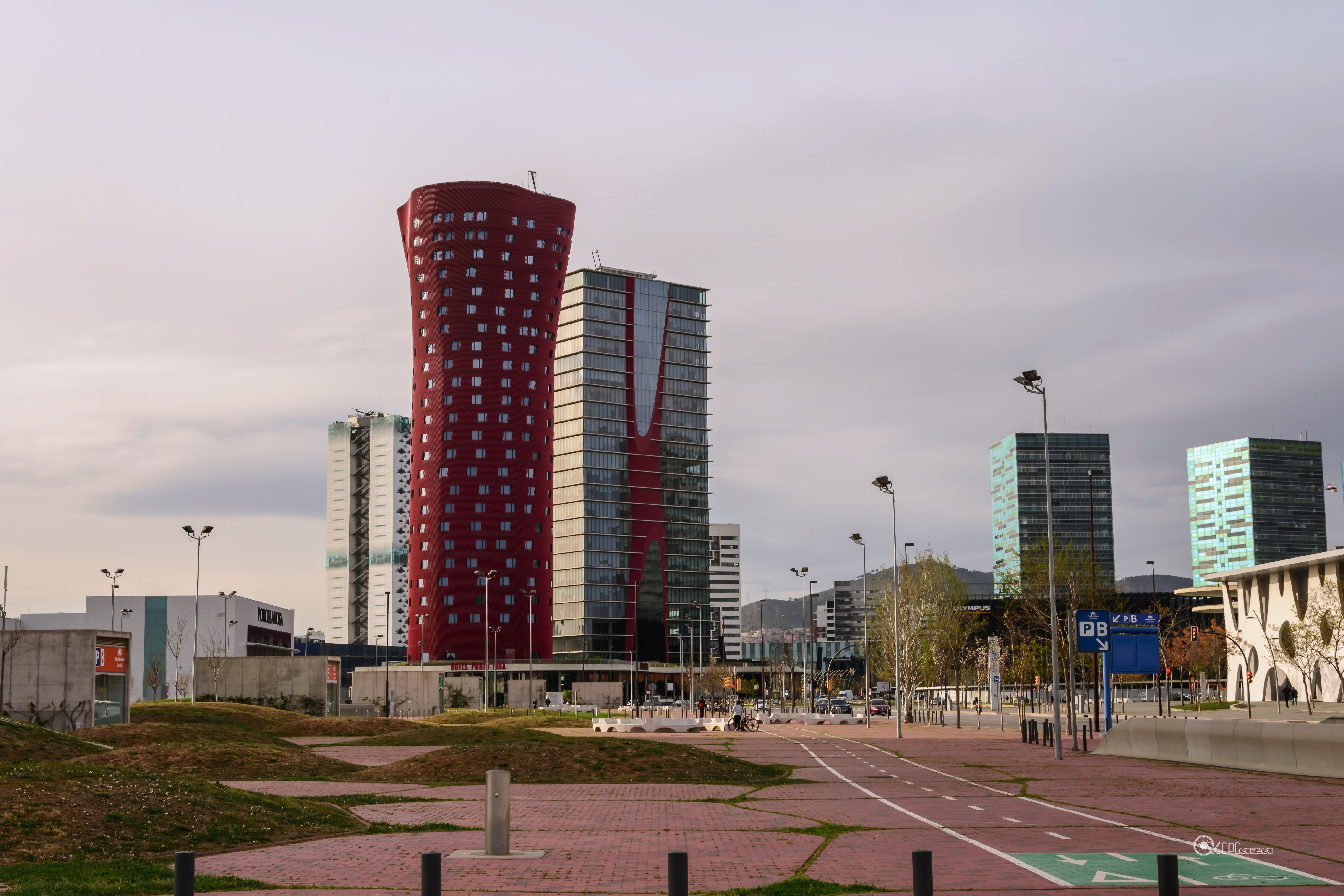 L'Hospitalet de Llobregat, Barcelona, Spain